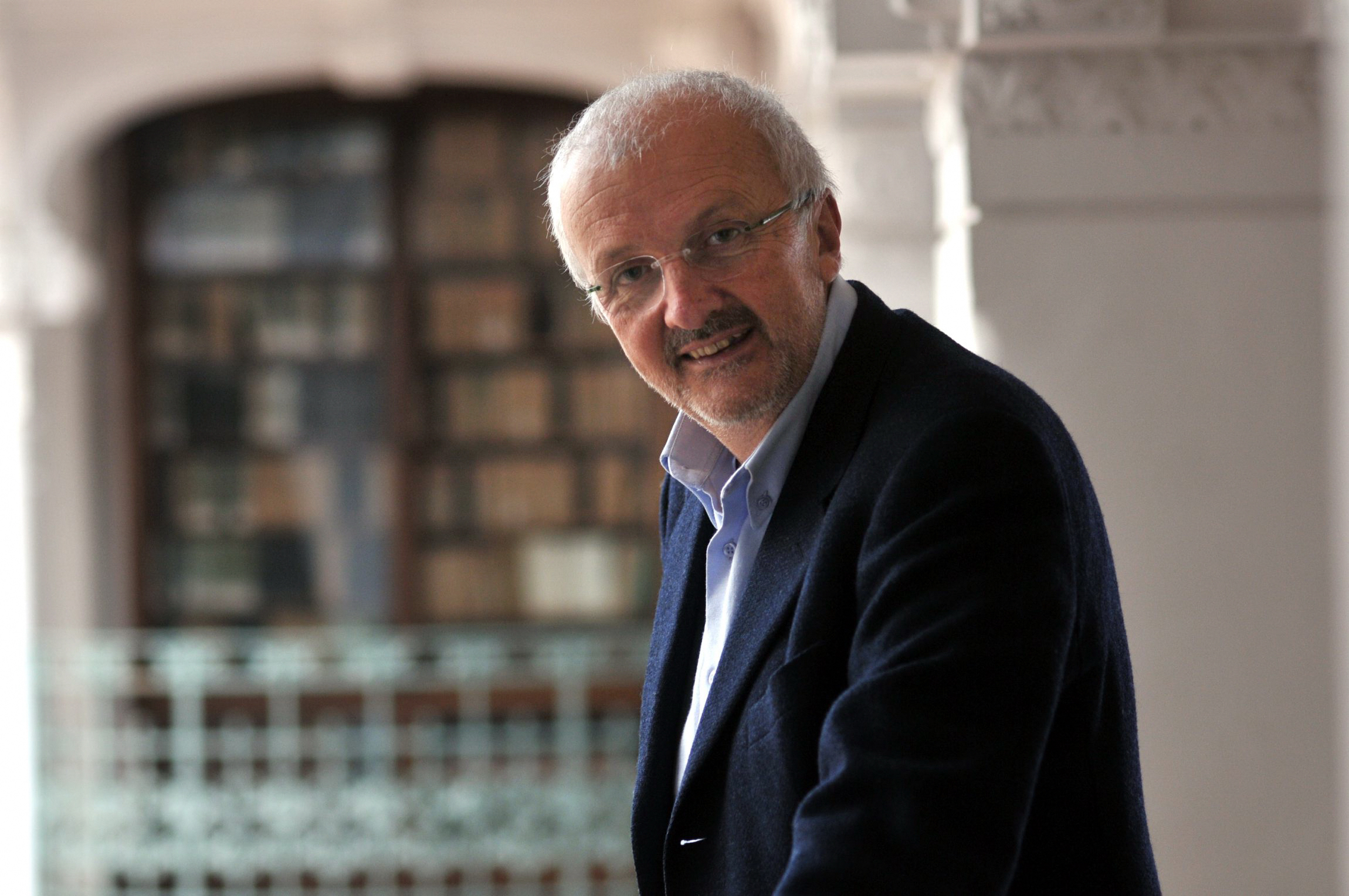 Franco Brevini 2010